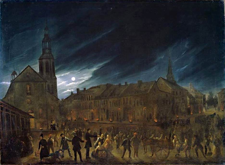 Le choléra à Québec en 1832, huile sur toile de Joseph Légaré, Musée des beaux-arts du Canada, no 7157. « En 1832, l’Occident est frappé par le choléra. Venu de l’Inde, il apparaît d’abord en France et en Angleterre avant de faire son apparition en Amérique. Ce sont principalement les immigrants irlandais qui rêvaient d’une vie meilleure et qui venaient en Amérique qui transportent la maladie. Québec n’y échappe pas et les premiers cas y font leur apparition au début du mois de juin. Au final, en 1832, sur une population de moins de 25000 personnes, on estime que plus de 2000 habitants en meurent, et c'est sans compter les immigrants eux-mêmes. Les connaissances de l’époque sont limitées et deux groupes de médecins s’affrontent. Il y a ceux qui croient que la maladie se transmet par contagion et ceux qui l’attribuent aux miasmes, c’est-à-dire ces nuages d’émanations provenant de l’eau stagnante, des détritus ou des matières en décomposition. Il y aura un autre épisode de choléra à Québec en 1834, mais de moindre sévérité. C’est lors de l’épidémie de 1832 que le cimetière des cholériques de la Grande Allée sera ouvert (au coin de l’avenue De Salaberry) ainsi que la station de quarantaine de la Grosse-Île. Dans une de ses œuvres, le peintre Joseph Légaré a représenté la crise du choléra de 1832. Cette peinture est très parlante. La scène se passe à la place du marché de la haute-ville, de nuit pour ajouter au drame. Il est intéressant d’observer une série de feux qui brûlent en bordure des rues De Buade et des Jardins. On voulait ainsi brûler les miasmes. La représentation est assez réaliste, bien que la foule arpentant la place du marché soit plutôt improbable, le gens apeurés demeurant cloîtrés chez eux, les plus fortunés ayant même quittés la ville. Il s’agit d’une crise dont les Québécois se souviendront longtemps. » – Société historique de Québec - Remerciements à l'historien Réjean Lemoine pour ses explications.